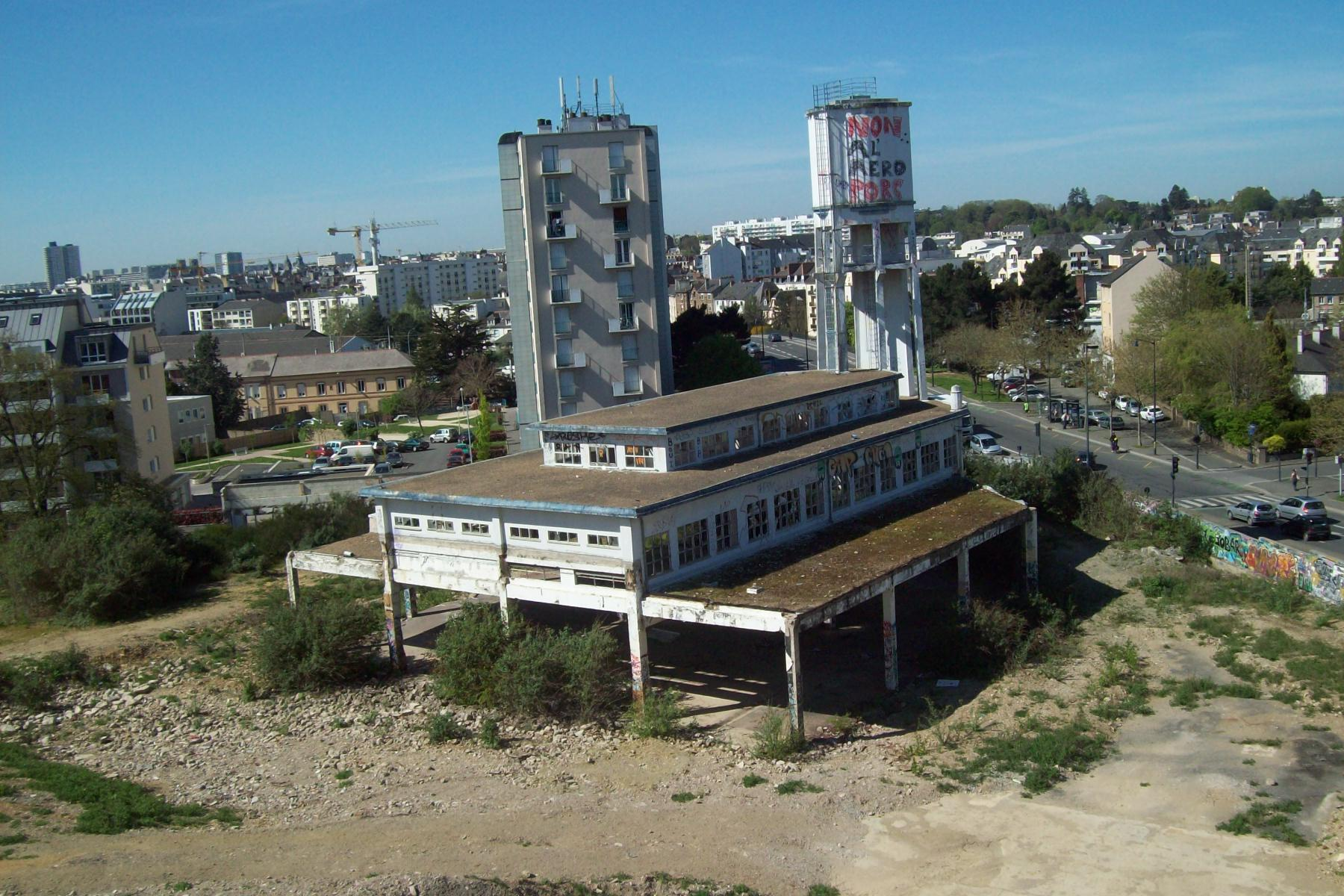 Bâtiment désaffecté de l'ancienne brasserie Saint-Hélier à Rennes vu d'un autre bâtiment de la brasserie.